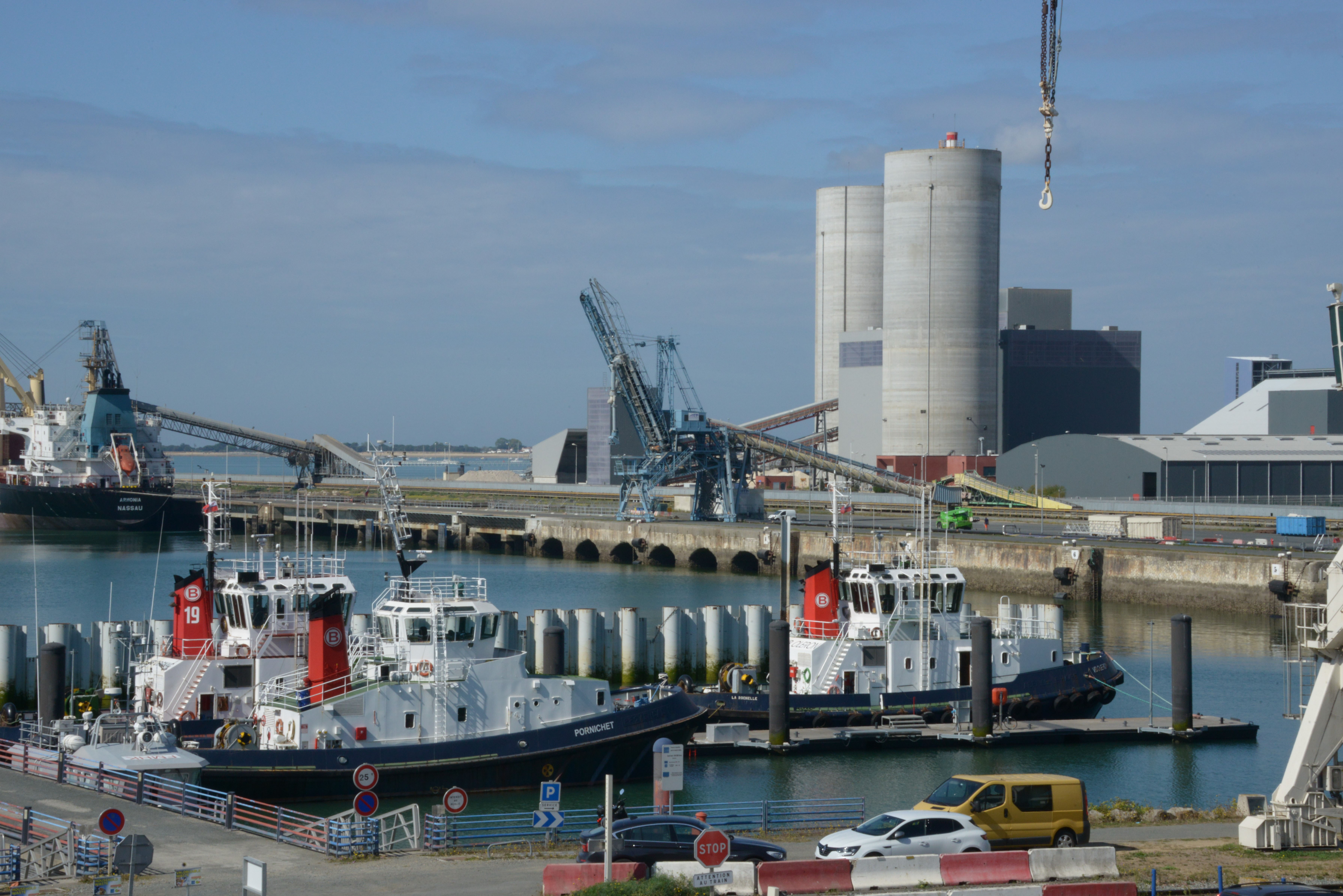 L’usine de production de ciment (centre de broyage de La Rochelle) située sur la pointe Saint-Marc dans l’enceinte du port de commerce de La Pallice. La Rochelle, Charente-Maritime, France.